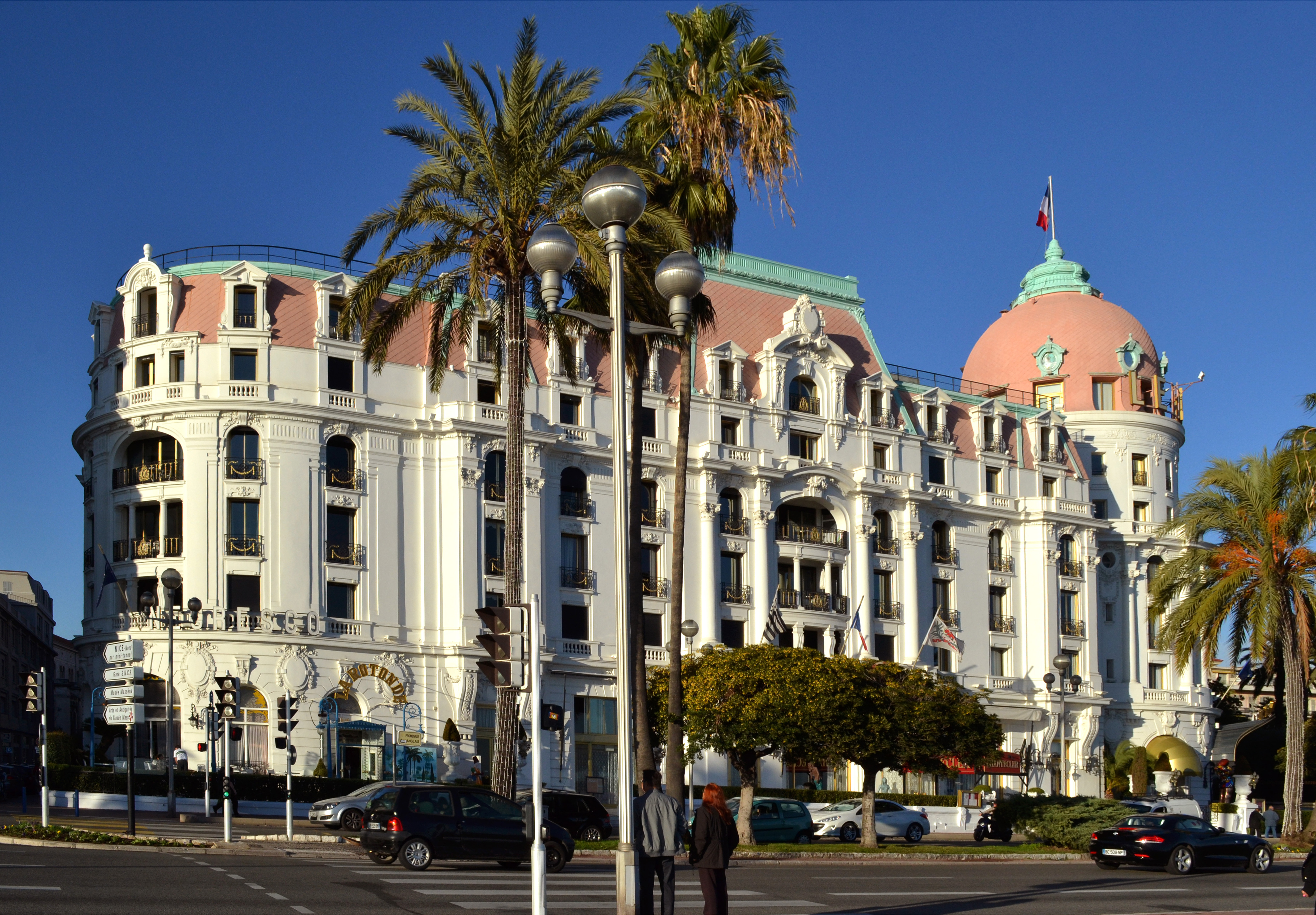 Hôtel Negresco (Nice, France)